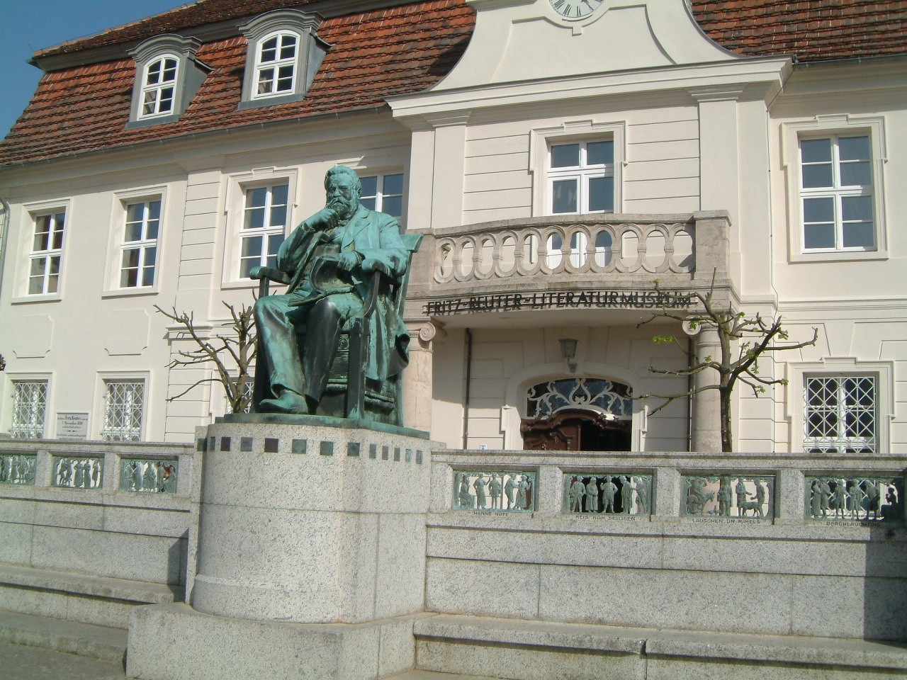 Fritz Reuter-Denkmal vor dem Fritz-Reuter-Literaturmuseum in der Reuterstadt Stavenhagen. Bildhauer: Wilhelm Wandschneider Von mir (Axel Brocke) selbst fotografiert am 05.05.2003. - GNU Free Documentation License: Vorlage:Bild-GFDL